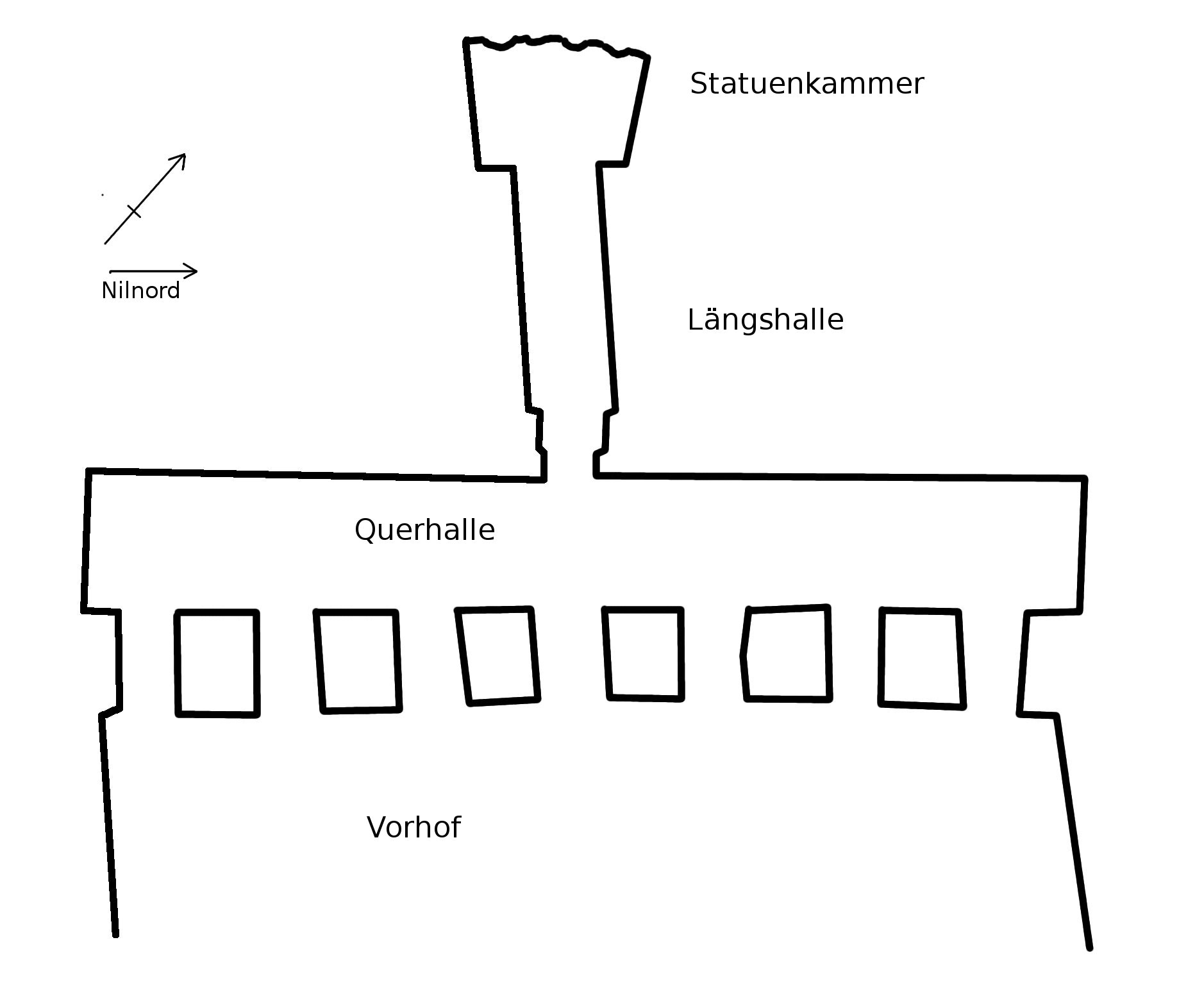 Grabblans von TT81 (Grab des Ineni) in Theben nach Vorbild der Pläne von Dziobek, Grab des Ineni, Tafel 47 und PM I-1, S. 180.